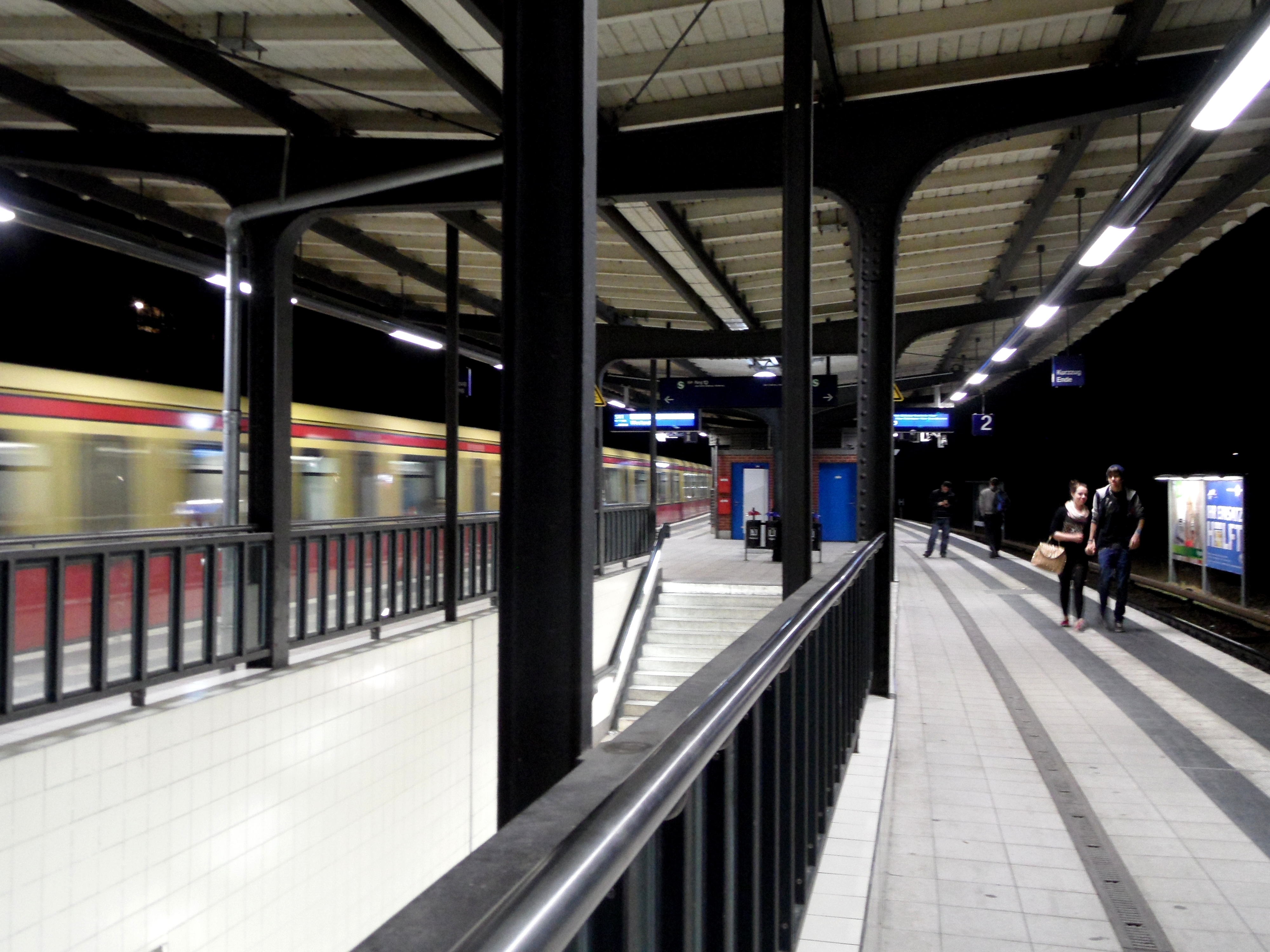 Berlin - S-Bahnhof Sonnenallee - Ringbahn Linien S41 und S42